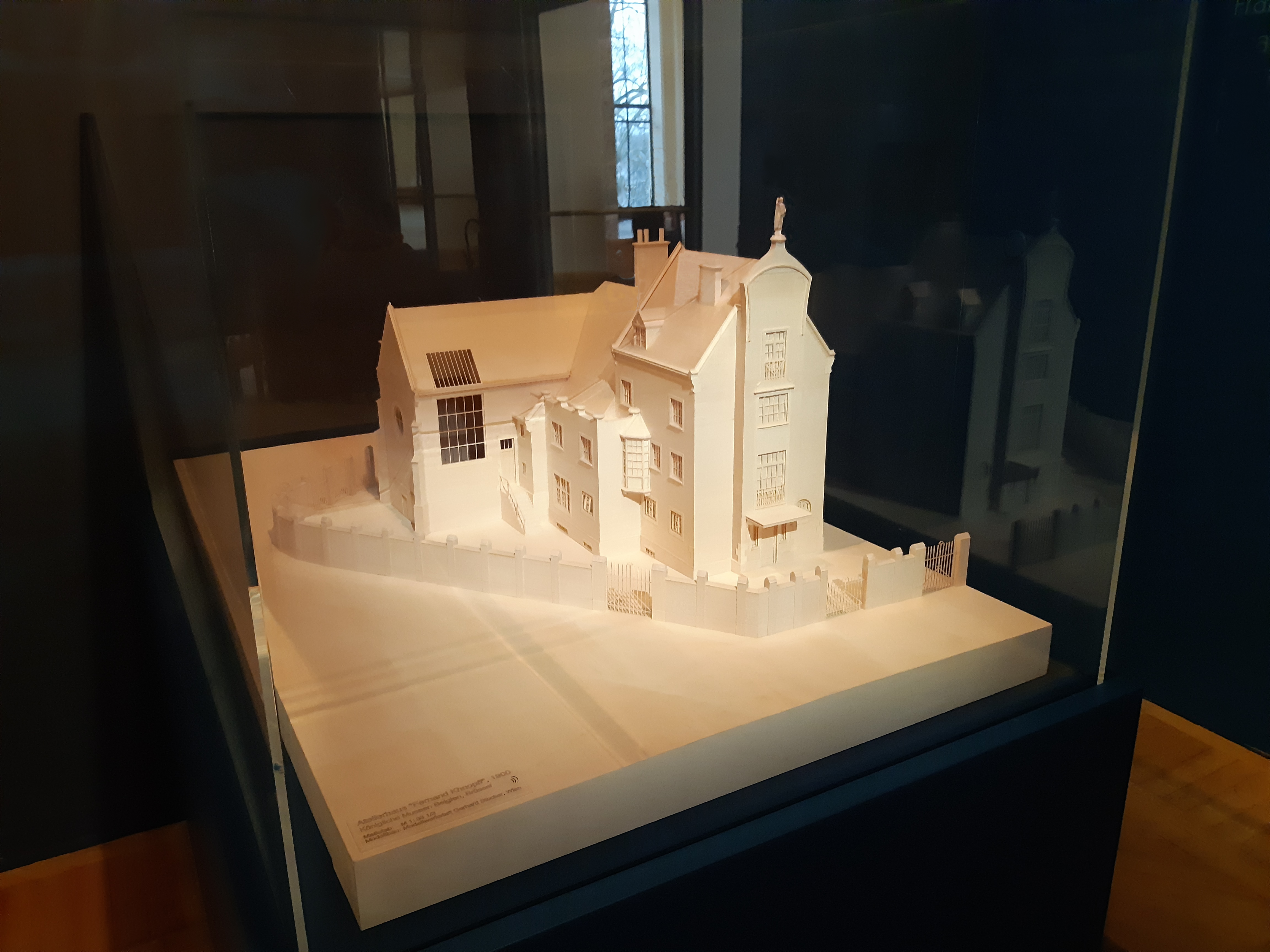 Maquette de la maison-atelier de Fernand Khnopff présentée lors de l'exposition "Fernand Khnopff, le maître de l’énigme" au Petit Palais (du 11 décembre 2018 au 17 mars 2019)